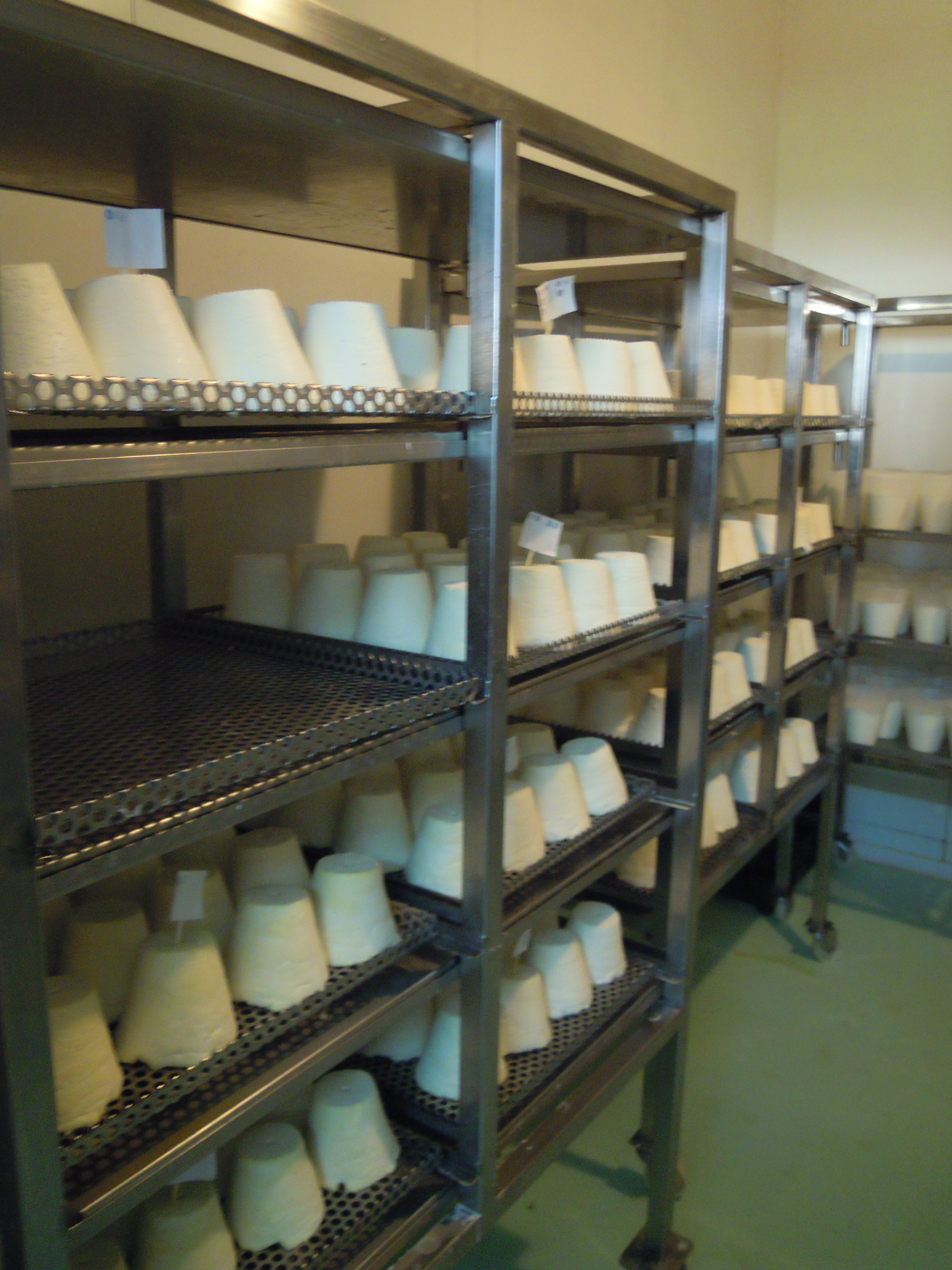 Maduración de los afuega'l pitu